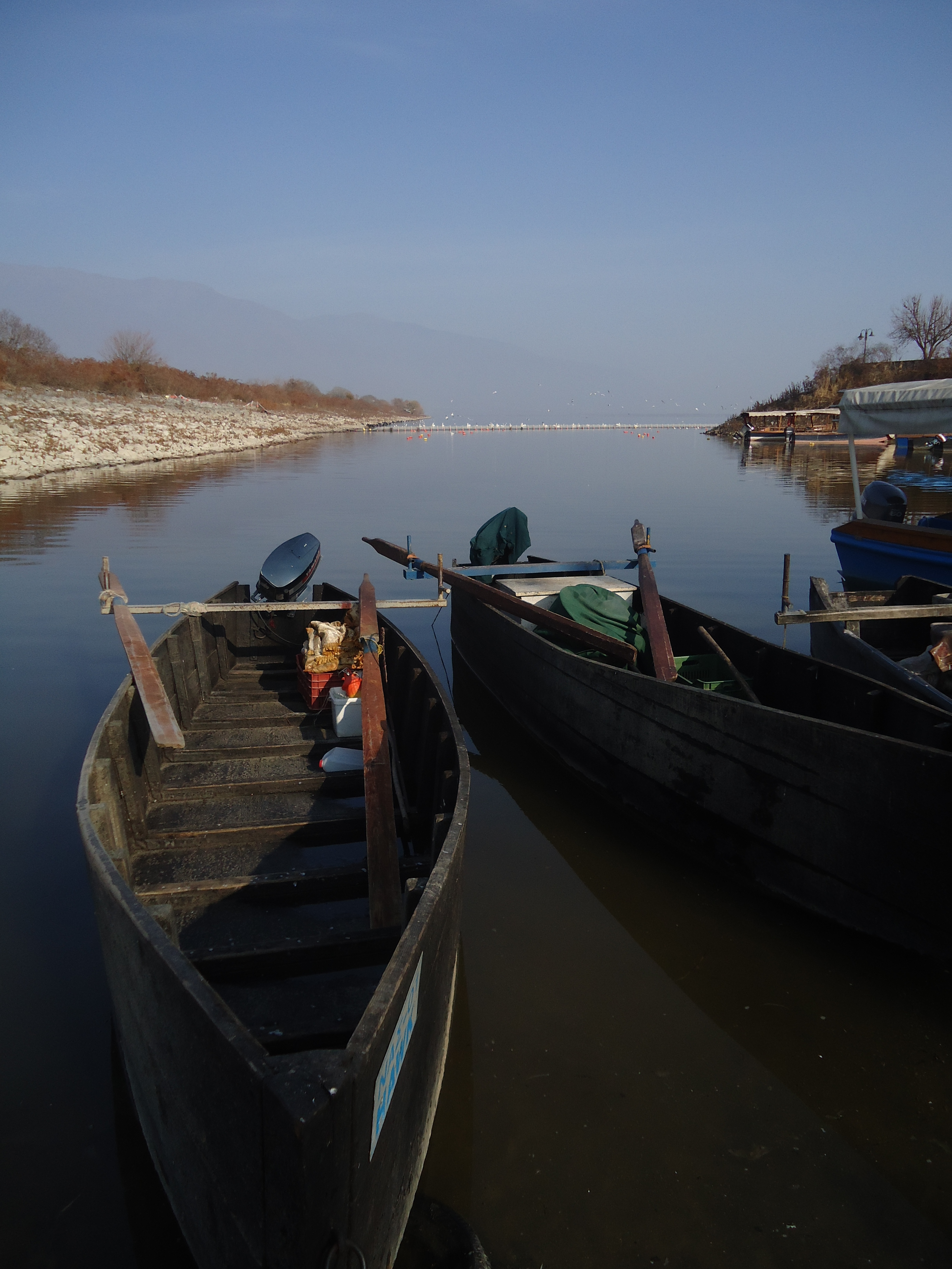 Ψαρόβαρκες στη λίμνη Κερκίνη